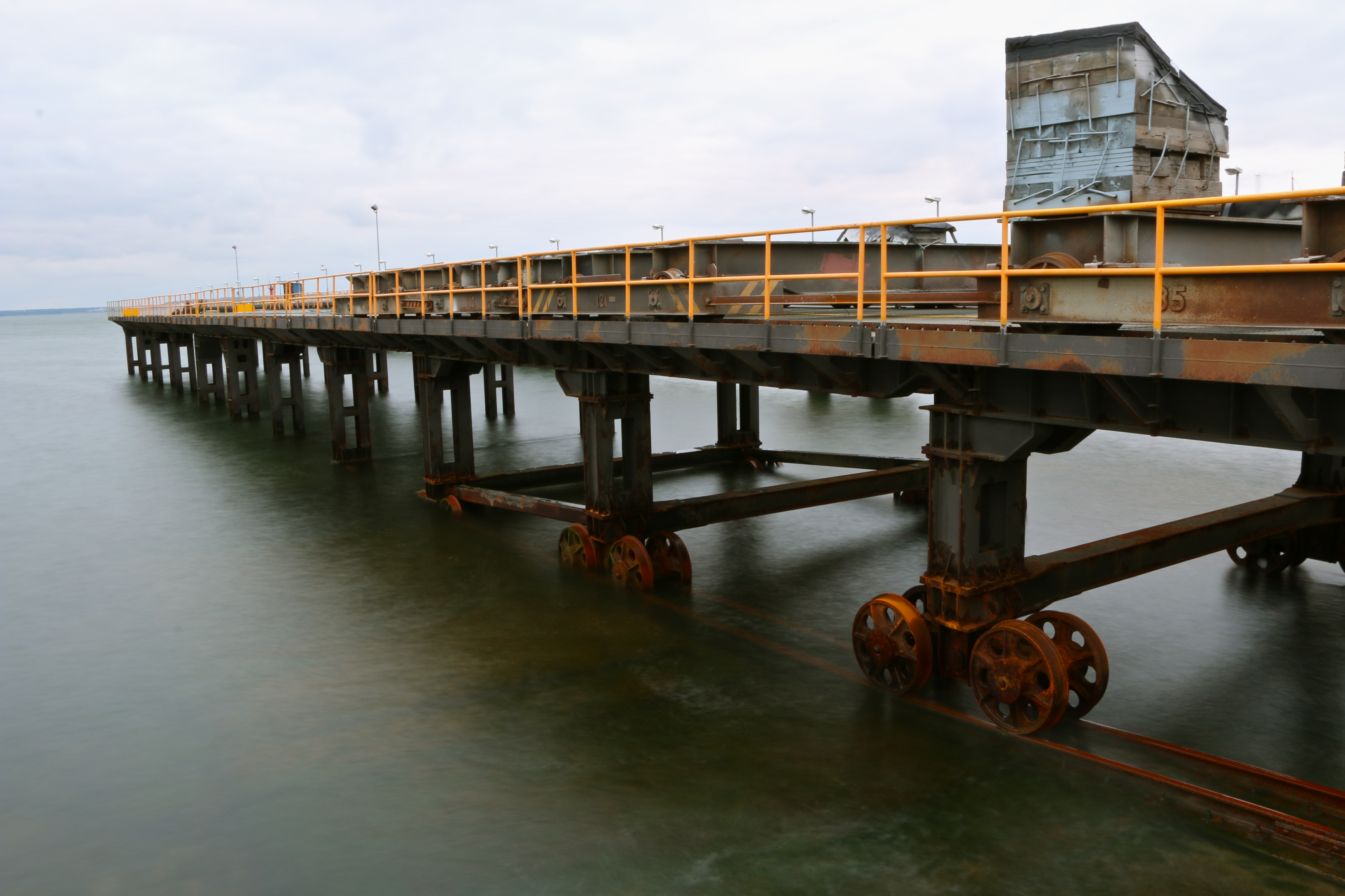 Noblessneri laevatehase elling , 1914–1915 (2 tugiraami 6 rööbasteega, liikuv sild, slipp alusraamiga, slipi muulid, masinaruum ajami- ja ülekandemehhanismid